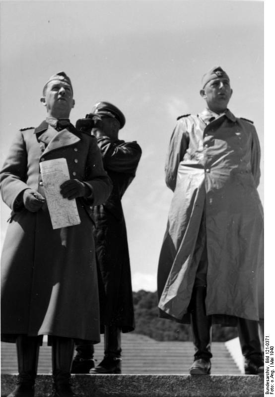 Am Hartmannsweiler [Hartmannswiller] Kopf; Generalmajor v. Bomhard (l.), Generalleutnant Daluege (r.)